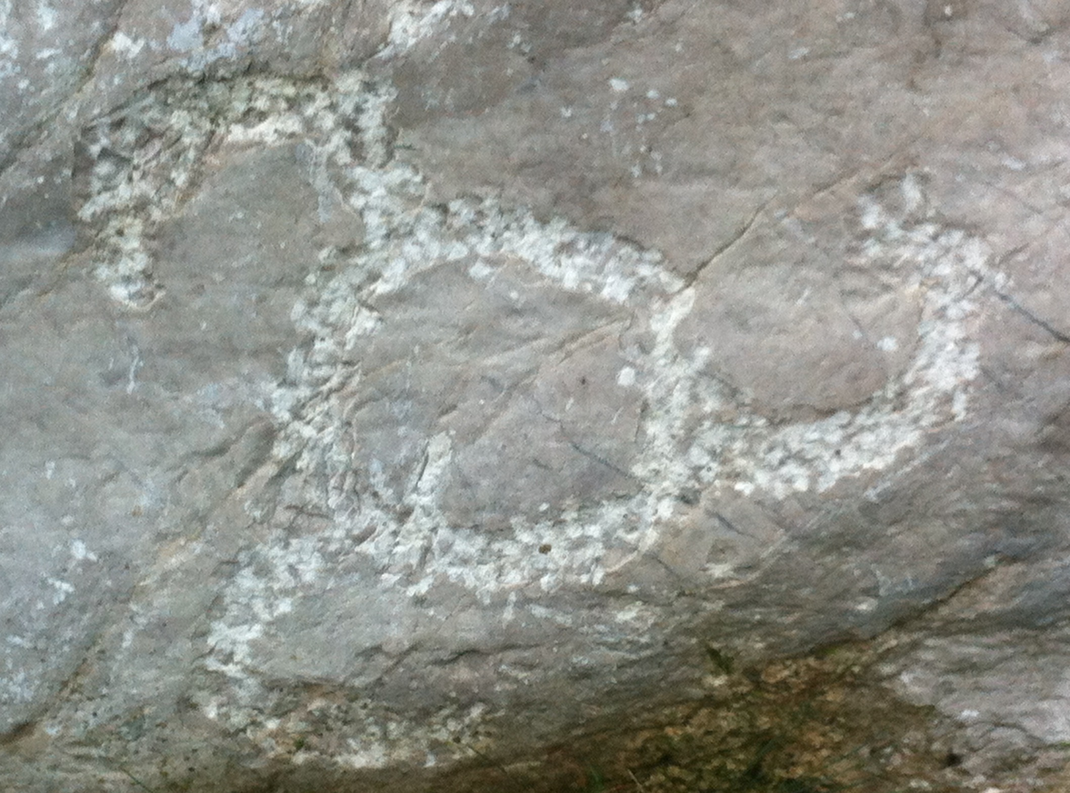 Фрагмент башни